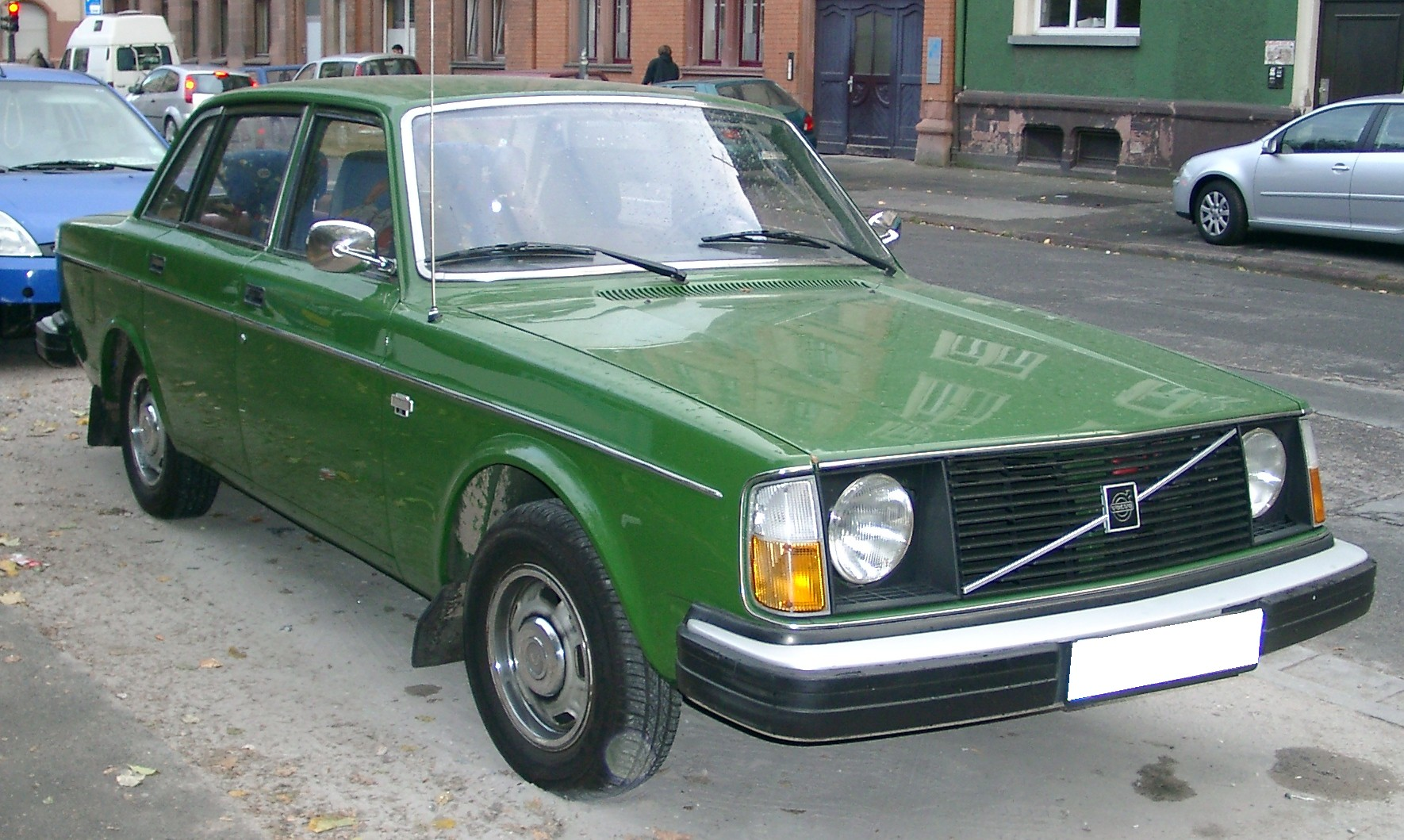 Volvo 244DL